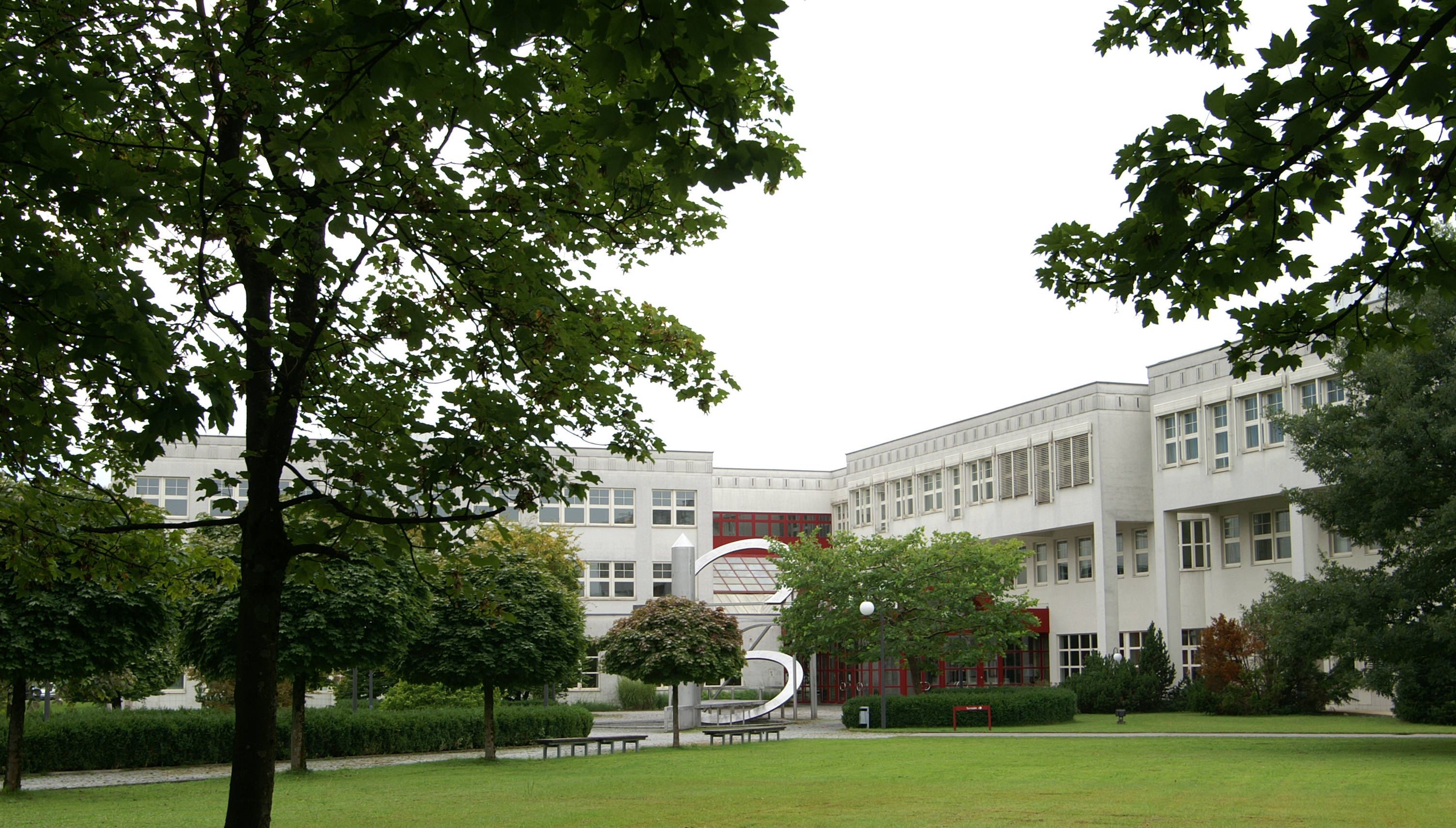 HTL Dornbirn und Universitätsinstitut für Textilchemie und Textilphysik im Stadtteil Schoren